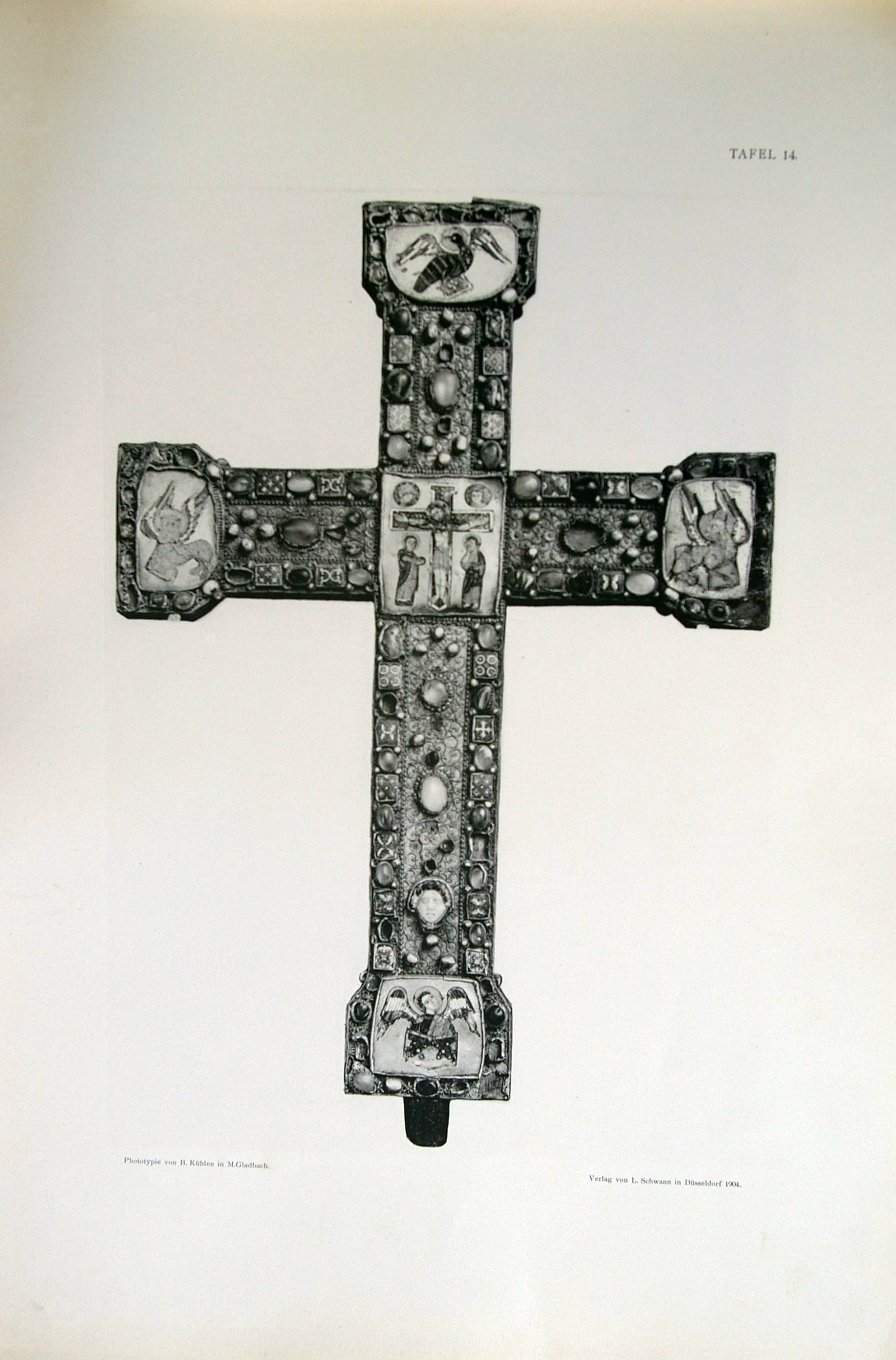 Tafel 14 von Georg Humanns „Die Kunstwerke der Münsterkirche zu Essen“: Vortragekreuz III (sog. Kreuz mit den großen Senkschmelzen)